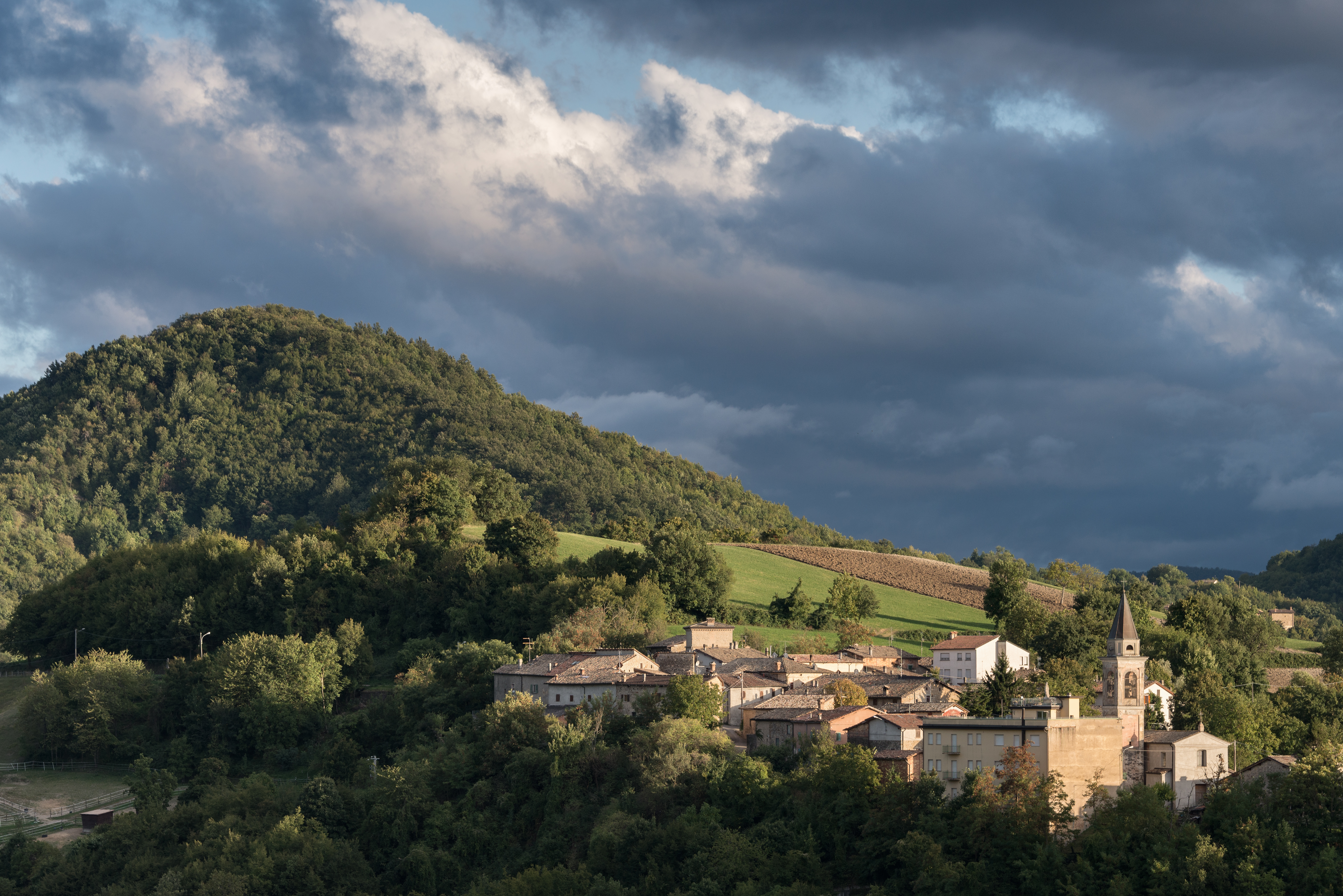 Ceredolo dei Coppi - Canossa, Reggio Emilia, Italia